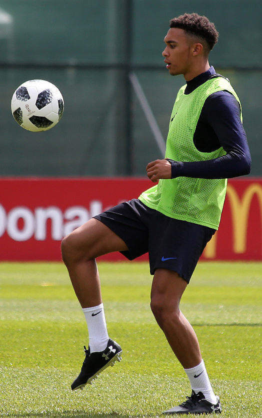 Каравай, самовар и сборная Англии. Кейн и компания готовятся к ЧМ-2018